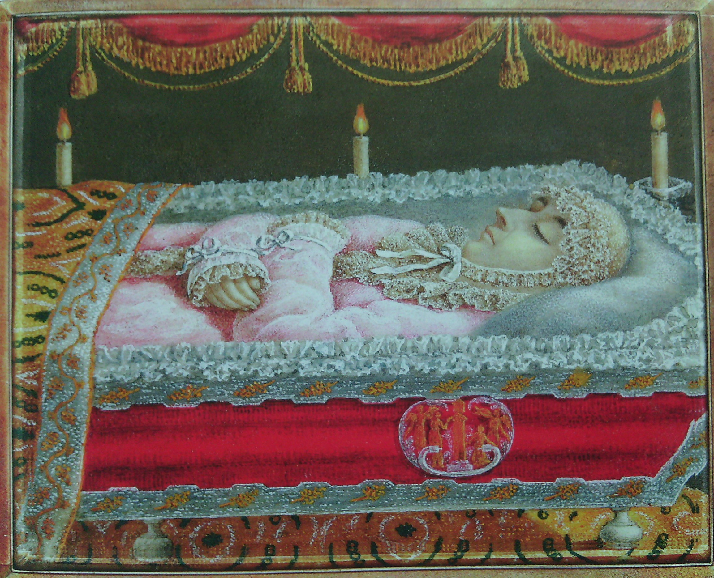 София Васильевна Соковнина, ур. Хованская (1788—1812) в гробу